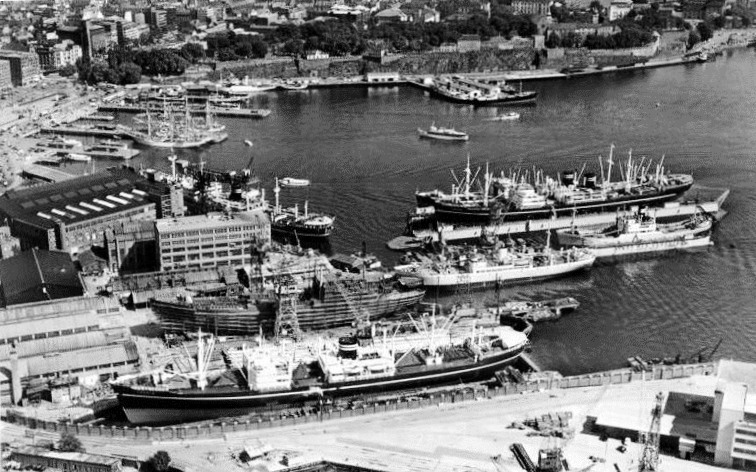 Skip i dokk, Skipene "Toulouse" og "Themis"?, Pipervika, Akerhuskaia #Flyfoto##